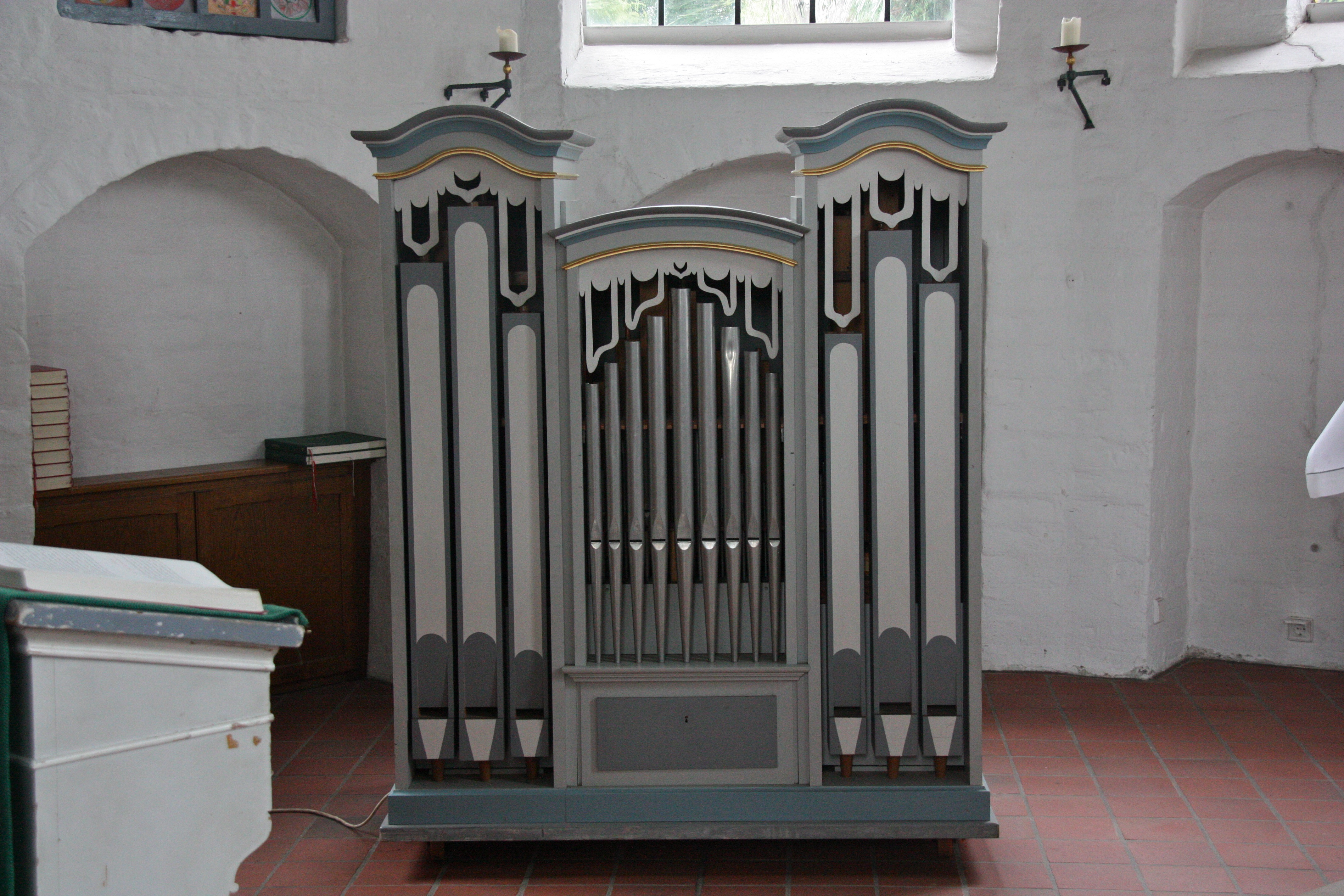 Sankt Johannis, Hamburg-Neuengamme, Kleine OrgelThis is a photograph of an architectural monument.